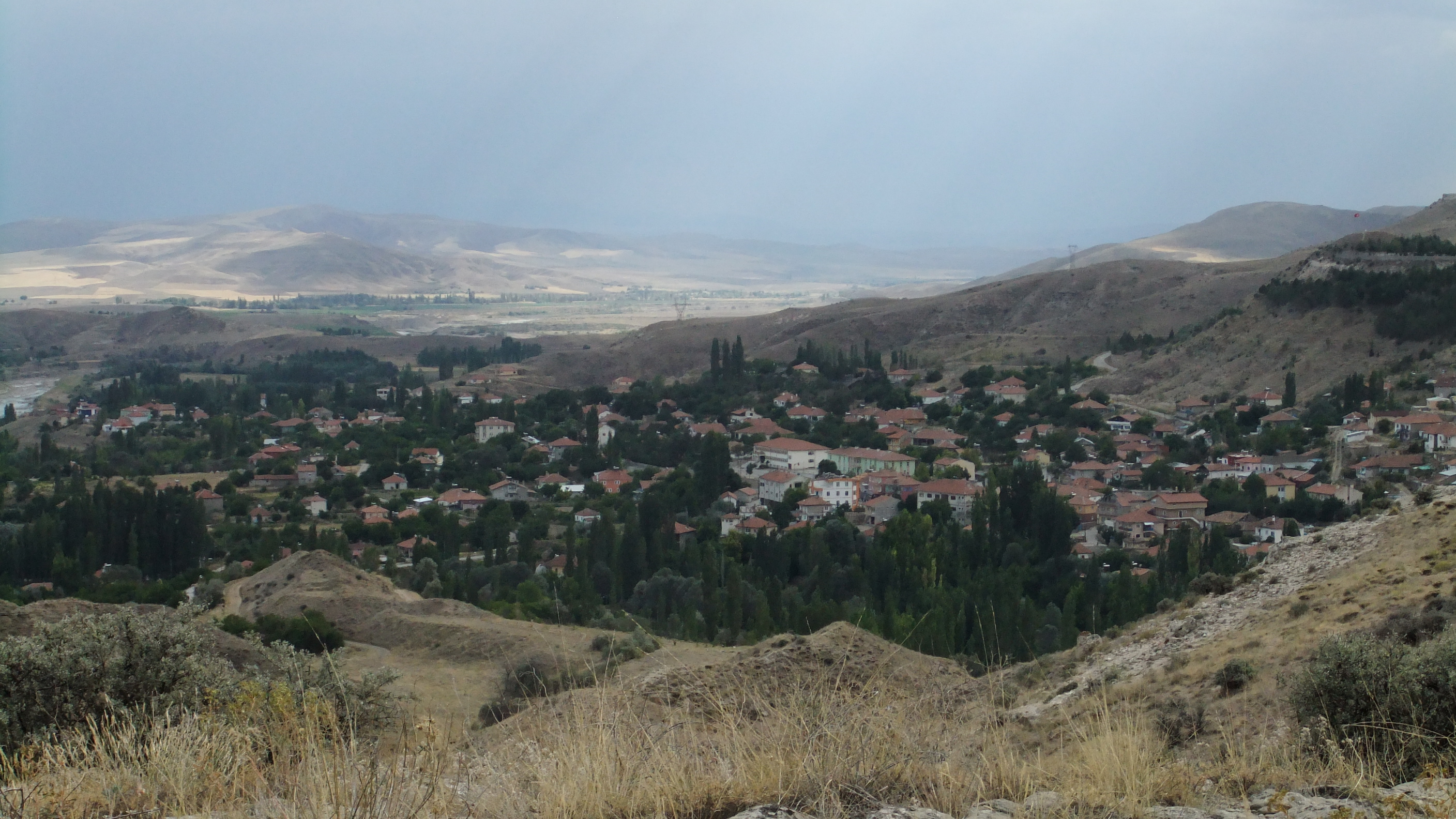 Keltepe'den Karaözü'nün alt tarafları, solda Kızılırmak, sağda kale tepesi